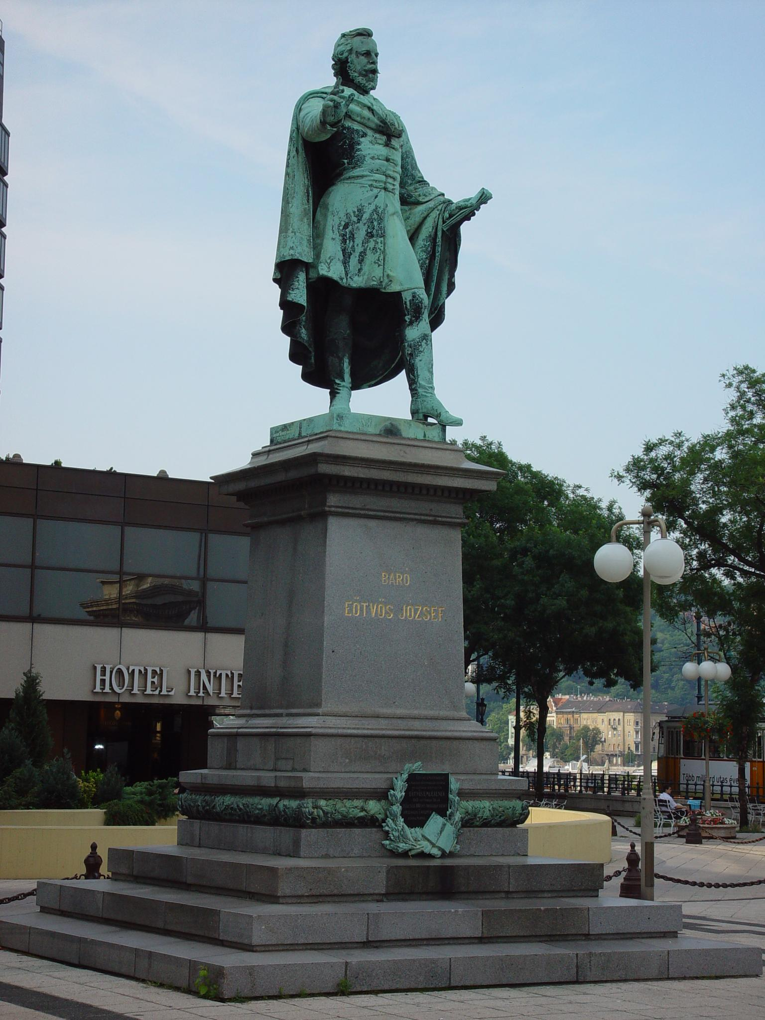 Eötvös József szobra Budapesten, az V. kerületi Eötvös téren, a Hotel Intercontinental bejárata előtt. saját felvétel